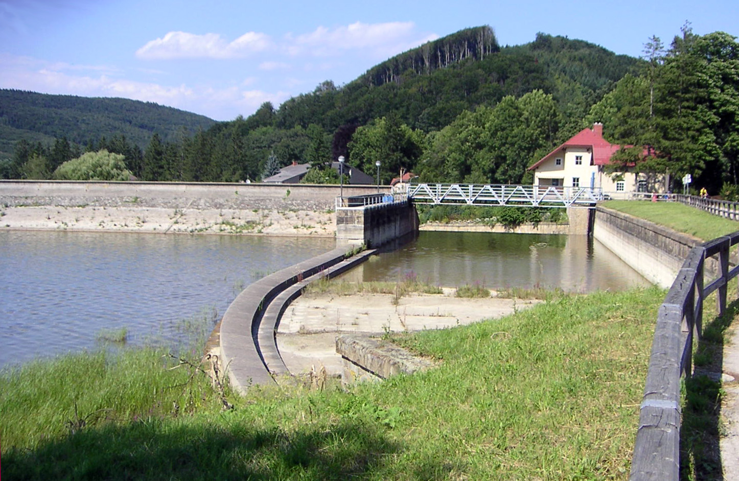 Wientalwasserwerk am Wienerwaldsee, das die Wientalwasserleitung speiste. Östlichster Eck des Sees. Südostende der Staumauer mit abgesenktem Überfallwehr am rechten Ufer und Sohlschwelle davor. Noch ohne die April 2020 auf Google Maps (von 2020) sichtbare Mauerausbesserung und "Bootsrechen" vor der Sohlschwelle. Fotografiert von Binter am 24.07.2005.